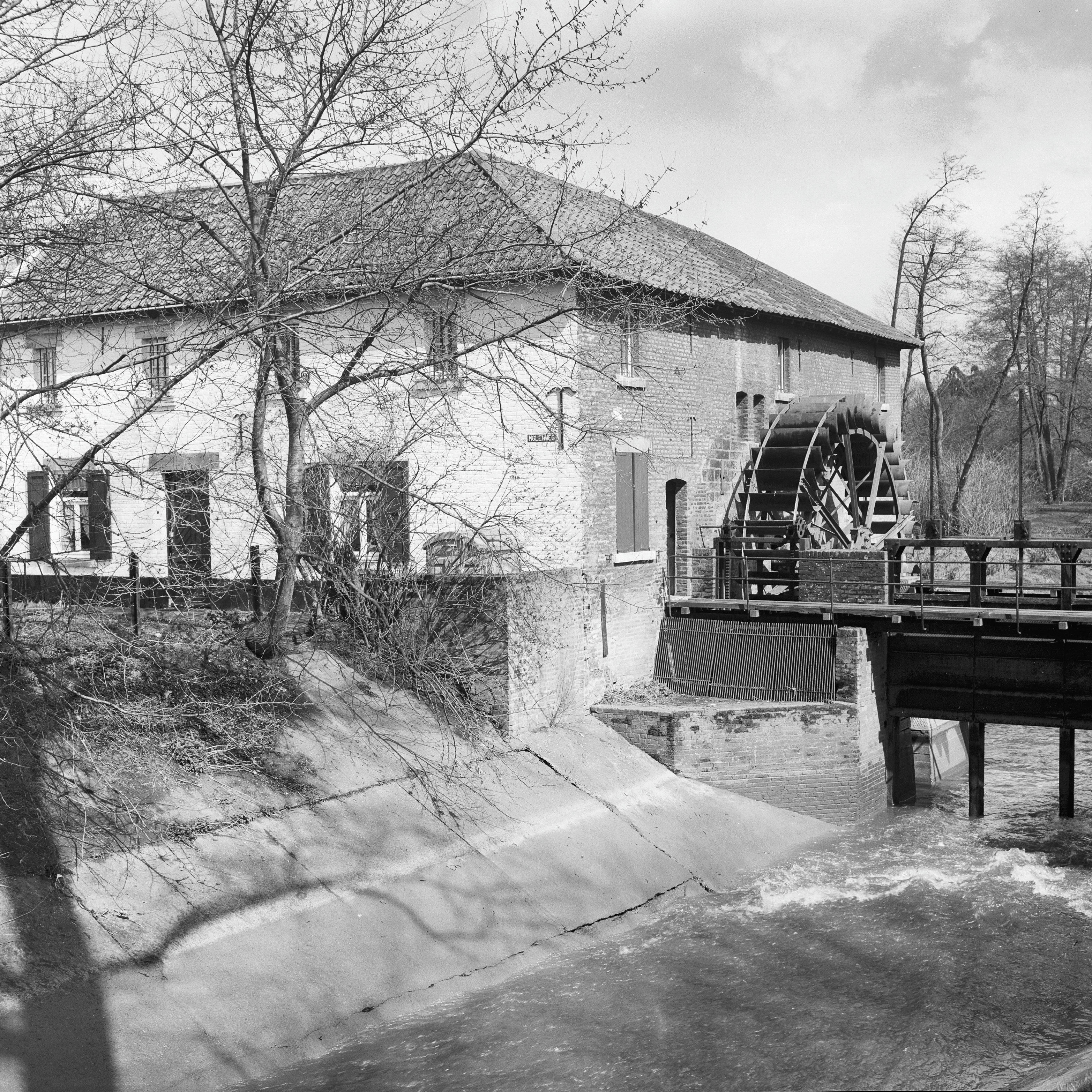 watermolen "De Ophovense Molen", exterieur vanuit het zuiden